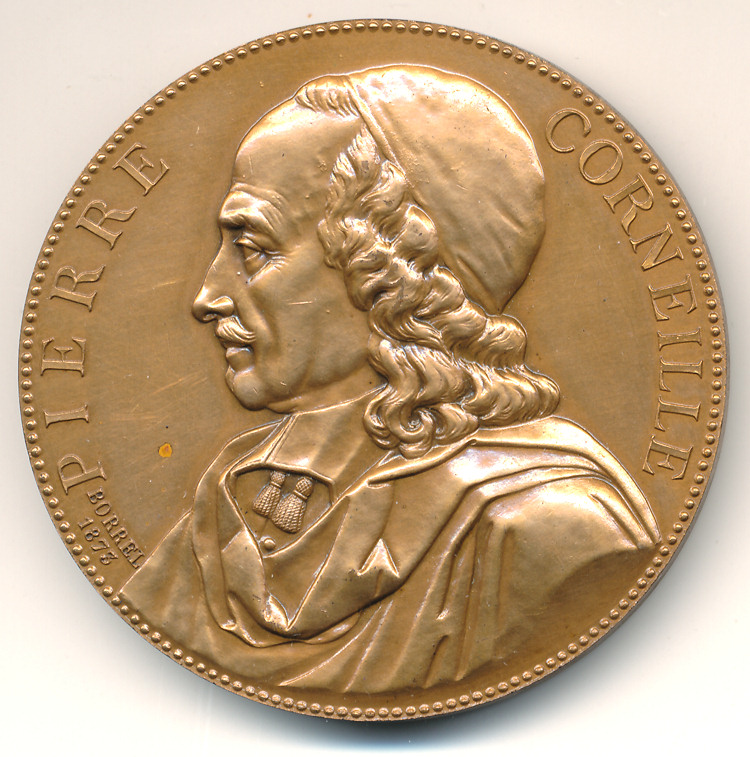 Revers de la médaille à l'effigie de Pierre Corneille par Borrel, 1873, bronze 50mm